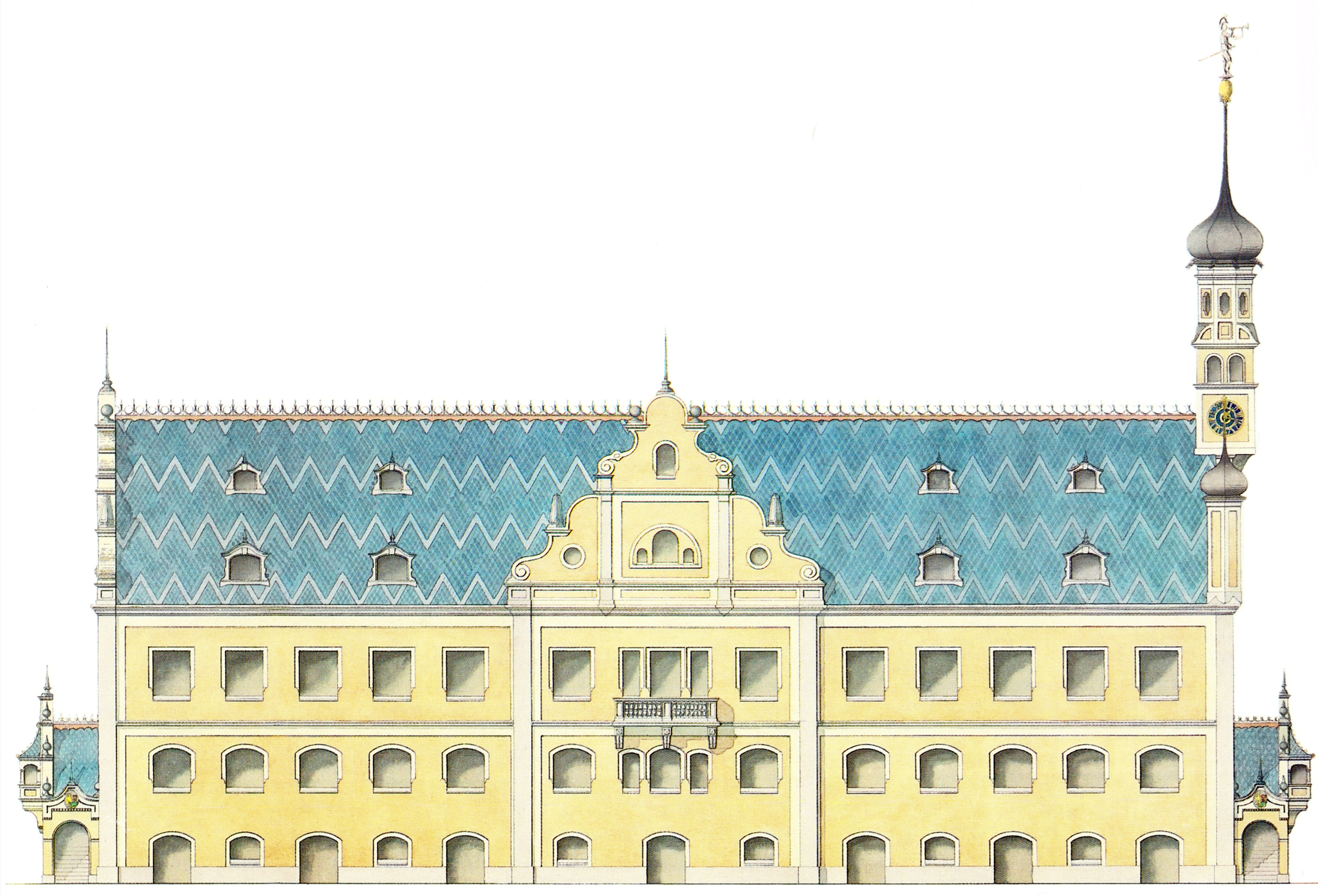 Entwurf von Rudolf Knapp zur Umgestaltung der Südfassade am Rathaus in Kempten.